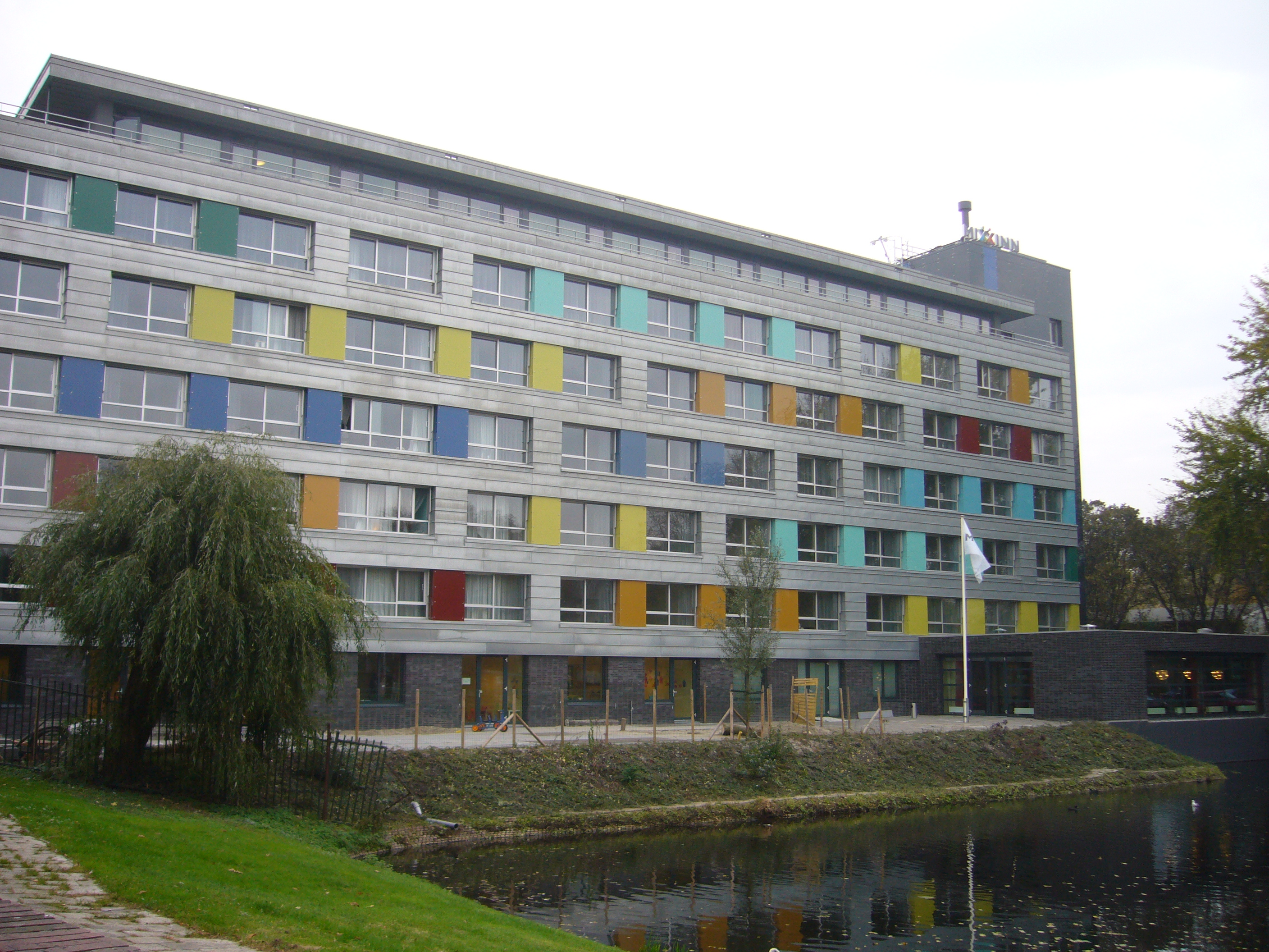 Mixxinn: Winnaar Nieuwe Stad Prijs 2009